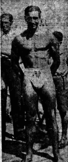 Ο Ανδρέας Κουραχάνης, υδατοσφαιριστής και κολυμβητής του Ολυμπιακού που σκοτώθηκε στο Αλβανικό μέτωπο